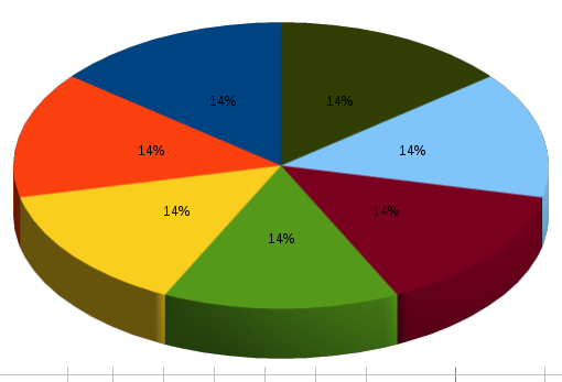 3D Kuchendiagramm, Verfälschung: Obwohl alle Kuchenstücke die selbe Größe haben, erscheinen die Stücke im Hintergrund größer.